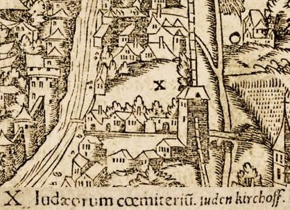 Der ab 1147 angelegte mittelalterliche jüdische Friedhof in Würzburg in einem Ausschnitt aus der von Sebastian Münster stammenden Stadtansicht. Der Friedhof wird darin als Iudæorum cœmiteriũ. Iuden kirchoff. bezeichnet.